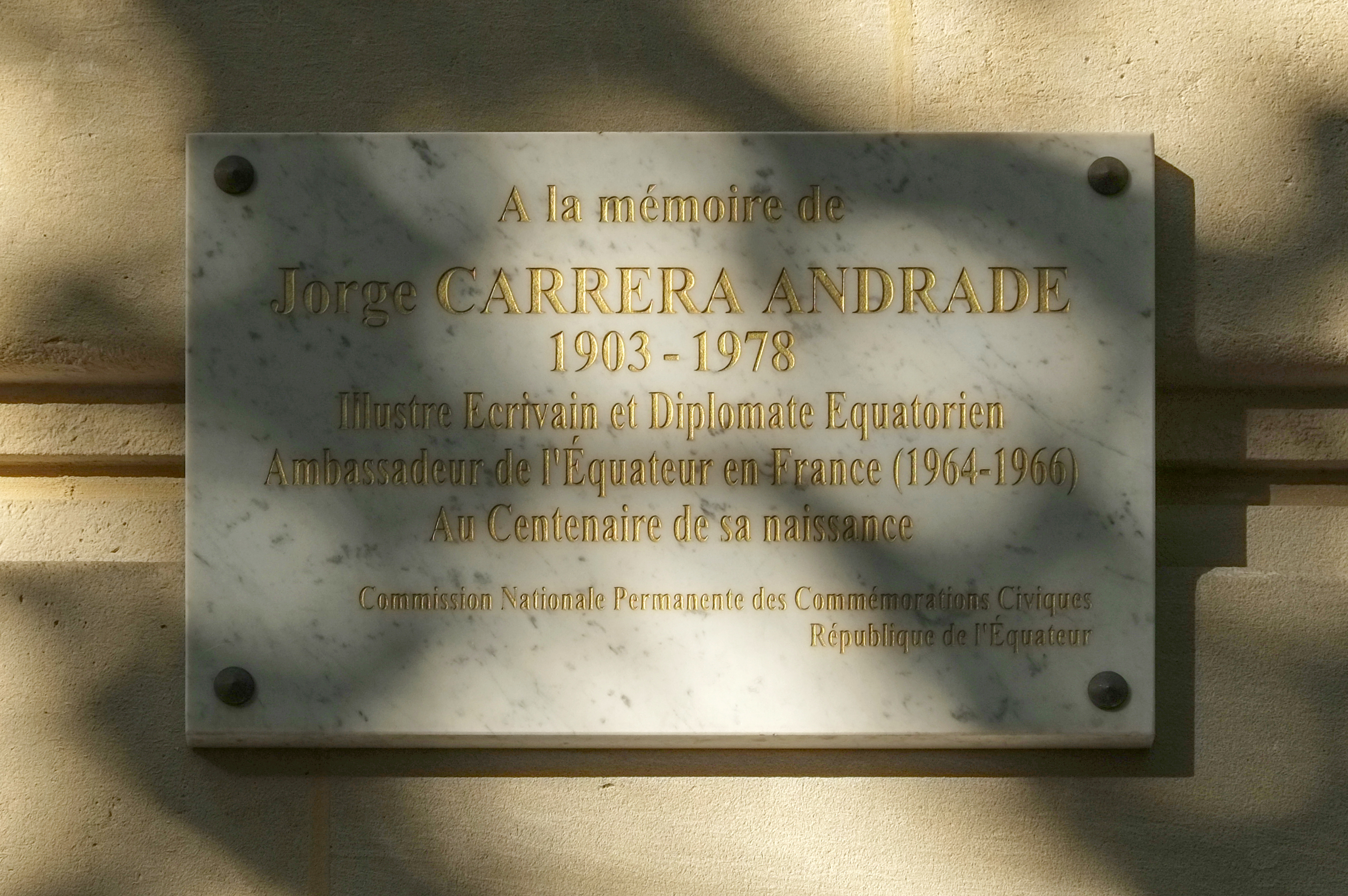 Haus Nr. 34 Avenue de Messine in Paris, Gedenktafel für Jorge Carrera Andrade